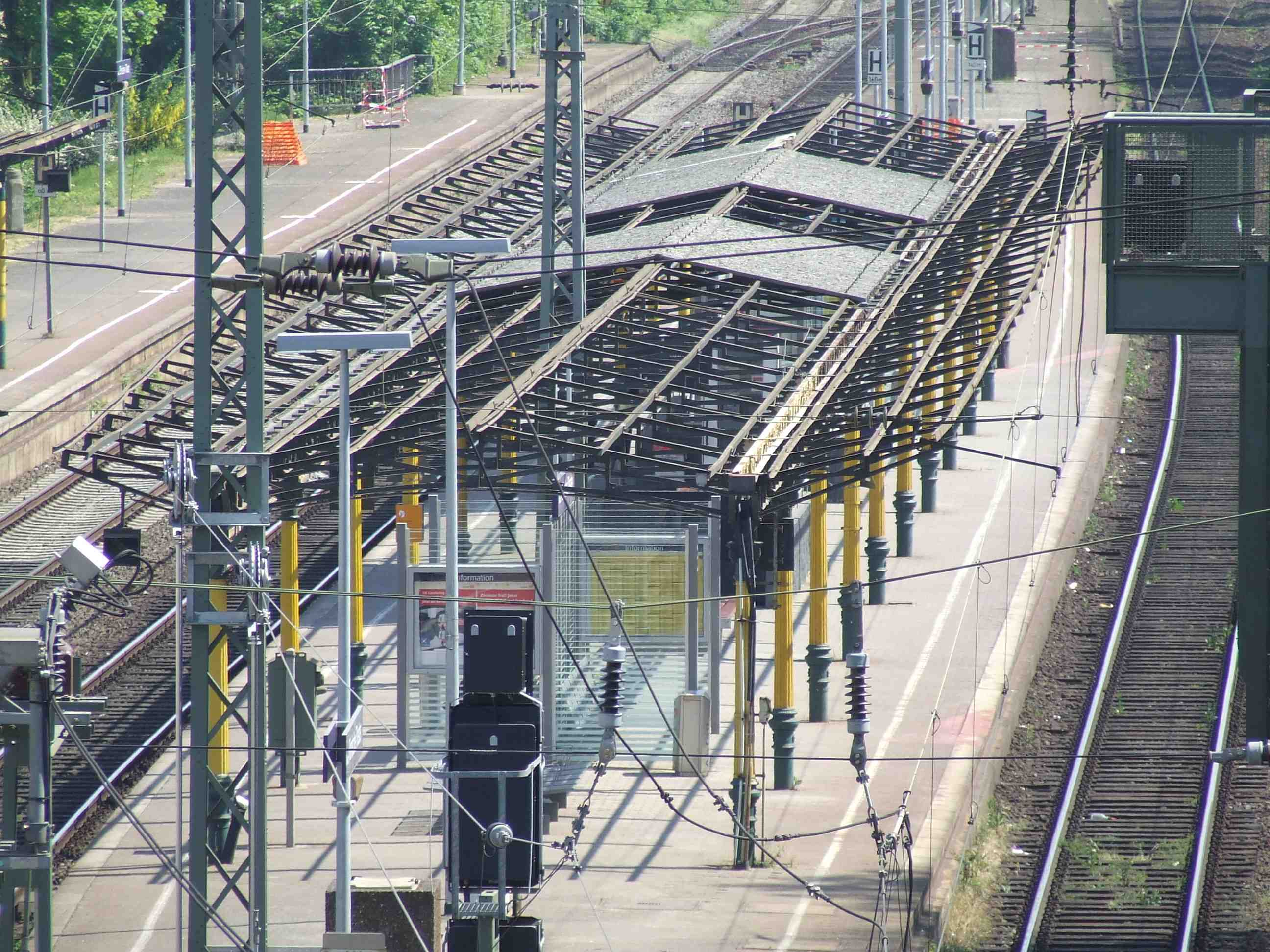 Bahnhof Mainz Römisches Theater.